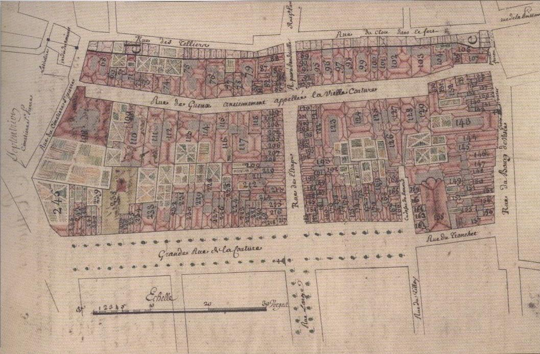 carte de la ville de Reims; plan terrier de 1759.